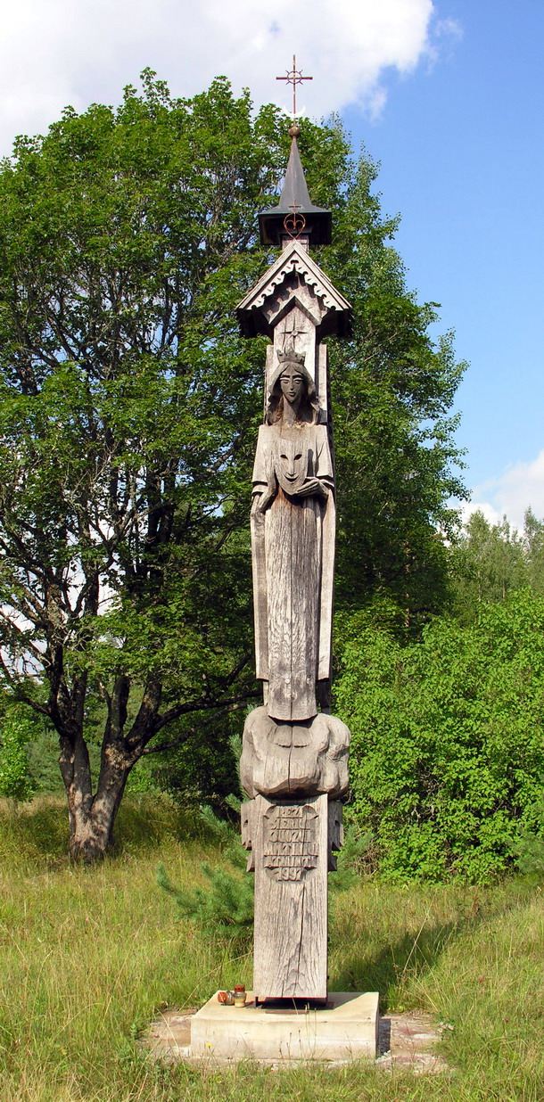 Ramoniškė, Mažeikių raj., Viekšnių seniūnija Režisieriaus Juozo Miltinio tėviškė Foto: Algirdas, 2006 m. rugpjūčio 15 d., Lietuva